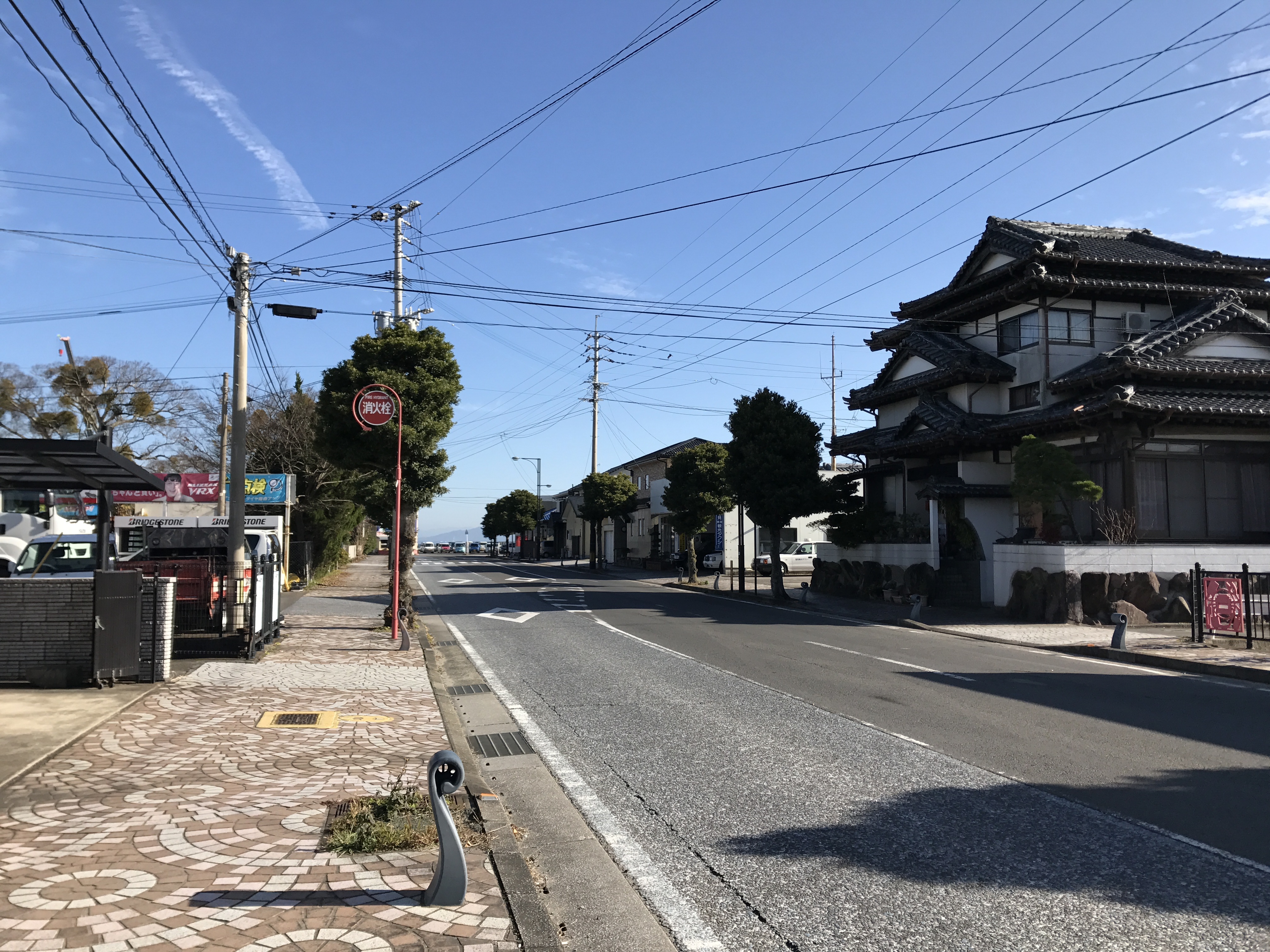 多比良港前の国道389号